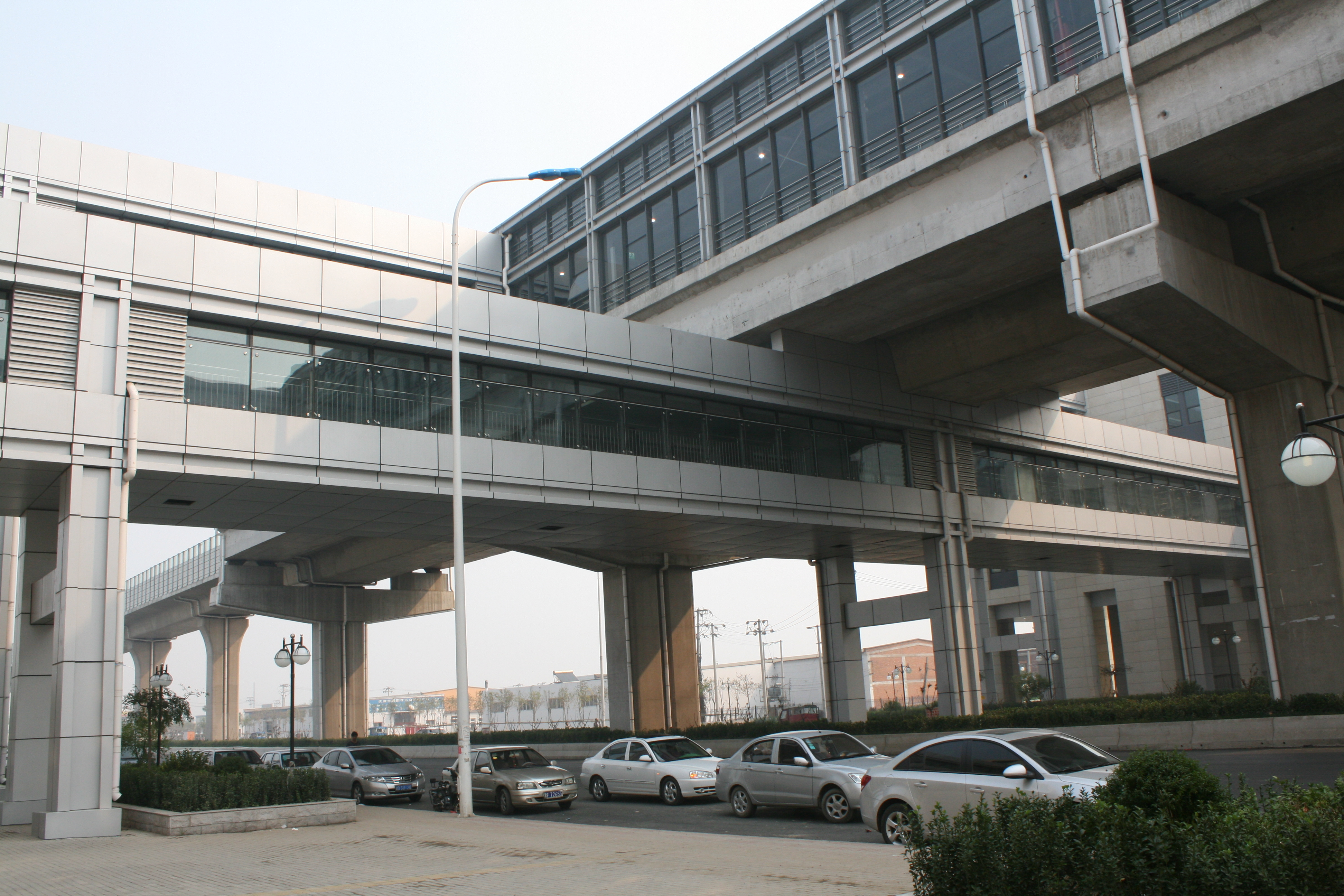 天津地鐵三號線華北集團站非付費區的換向通道